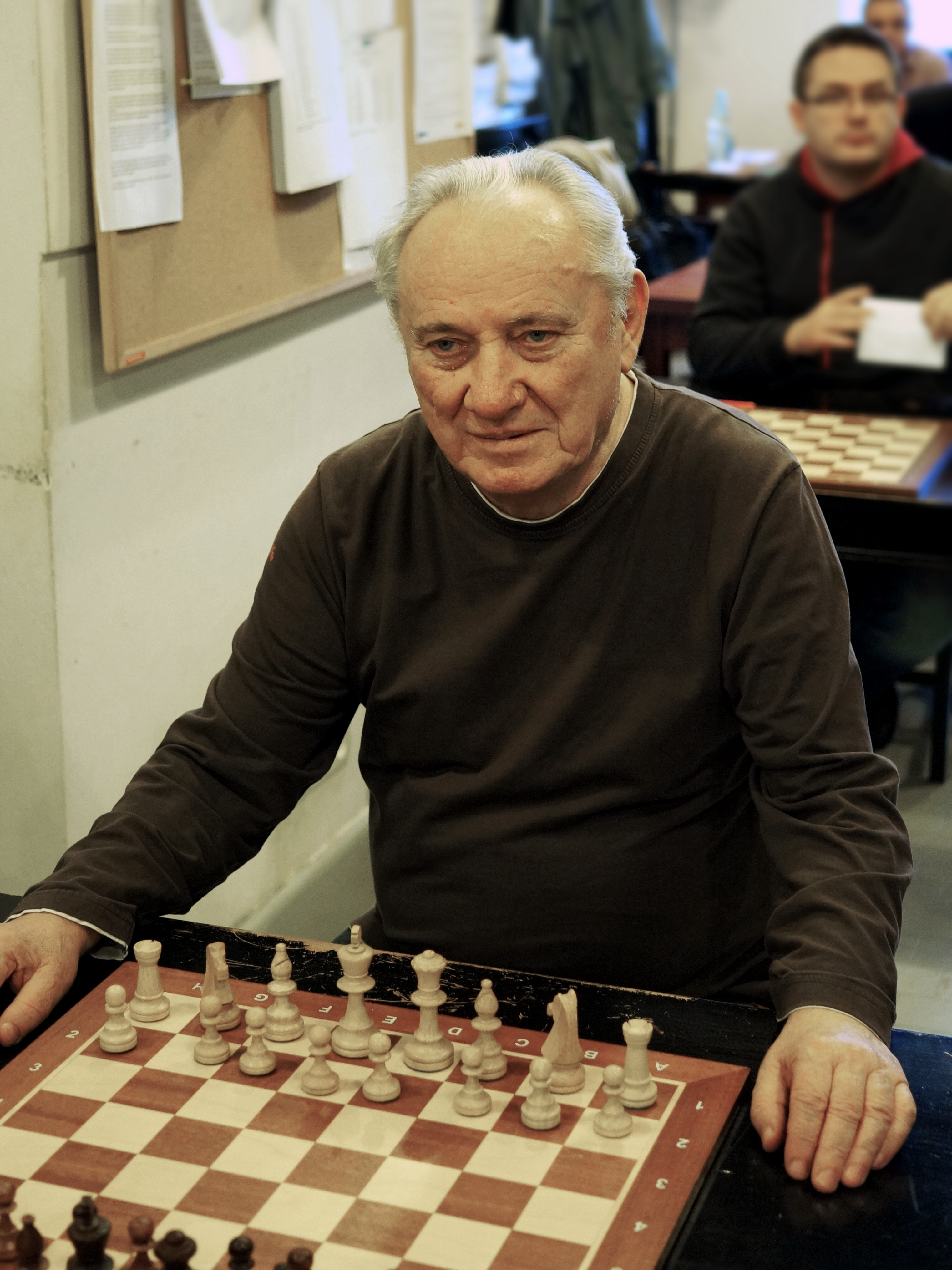 Waldemar Tura (ur. 14 marca 1942 w Lublinie) – polski szachista, arcymistrz kompozycji szachowej. Zdjęcie wykonane w siedzibie Polskiego Związku Szachowego w Warszawie, 15 listopada 2014.